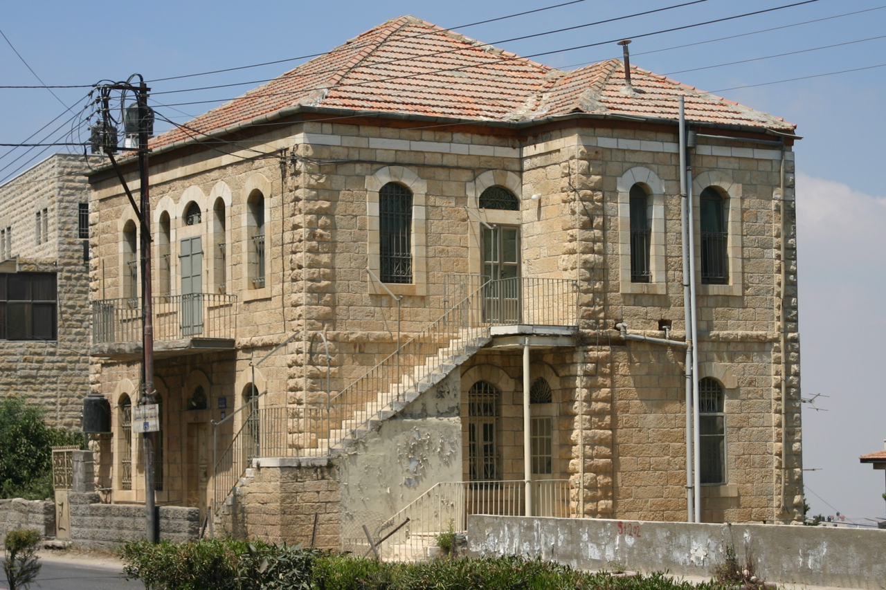 Ramallah, Palästina.